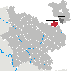 Crinitz in Brandenburg (Country) - District Elbe-Elster